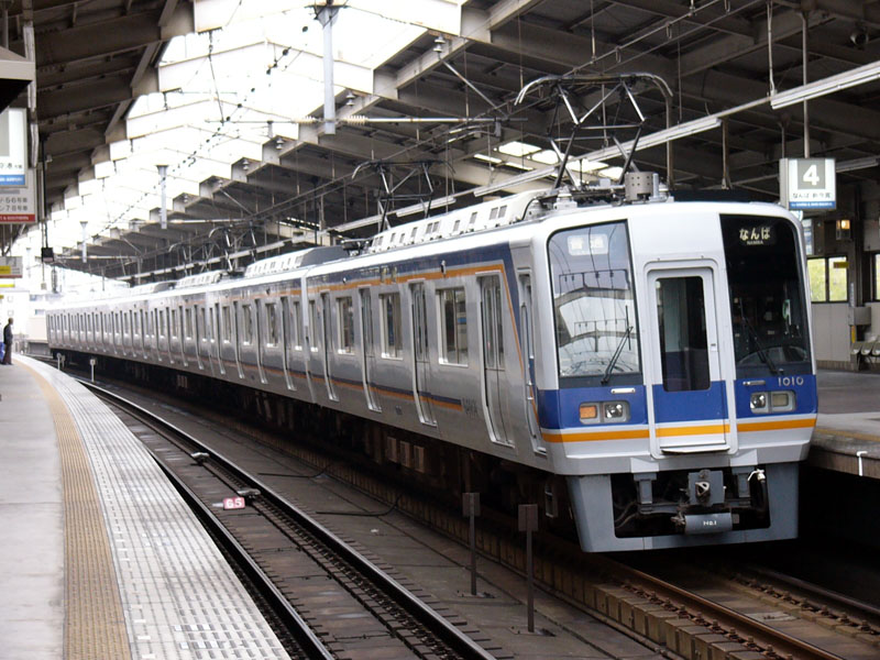 南海1000系2次車 2005年11月03日 天下茶屋駅にて（投稿者が撮影）